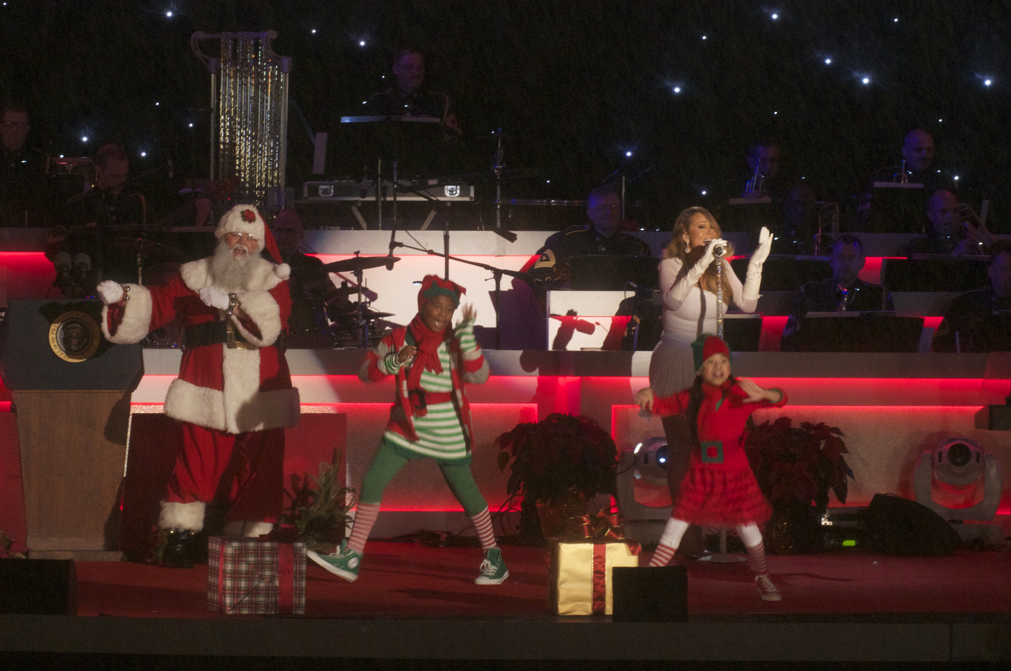 Mariah Carey durante su mini-residencia navideña de conciertos en Nueva York (Diciembre de 2013).